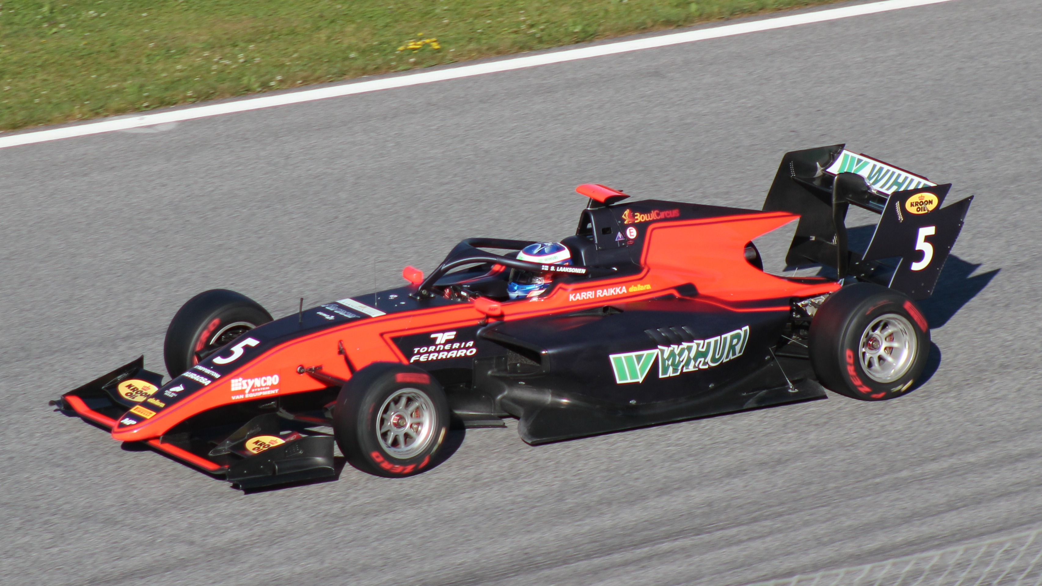 Laaksonen beim Rennwochenende in Österreich 2019